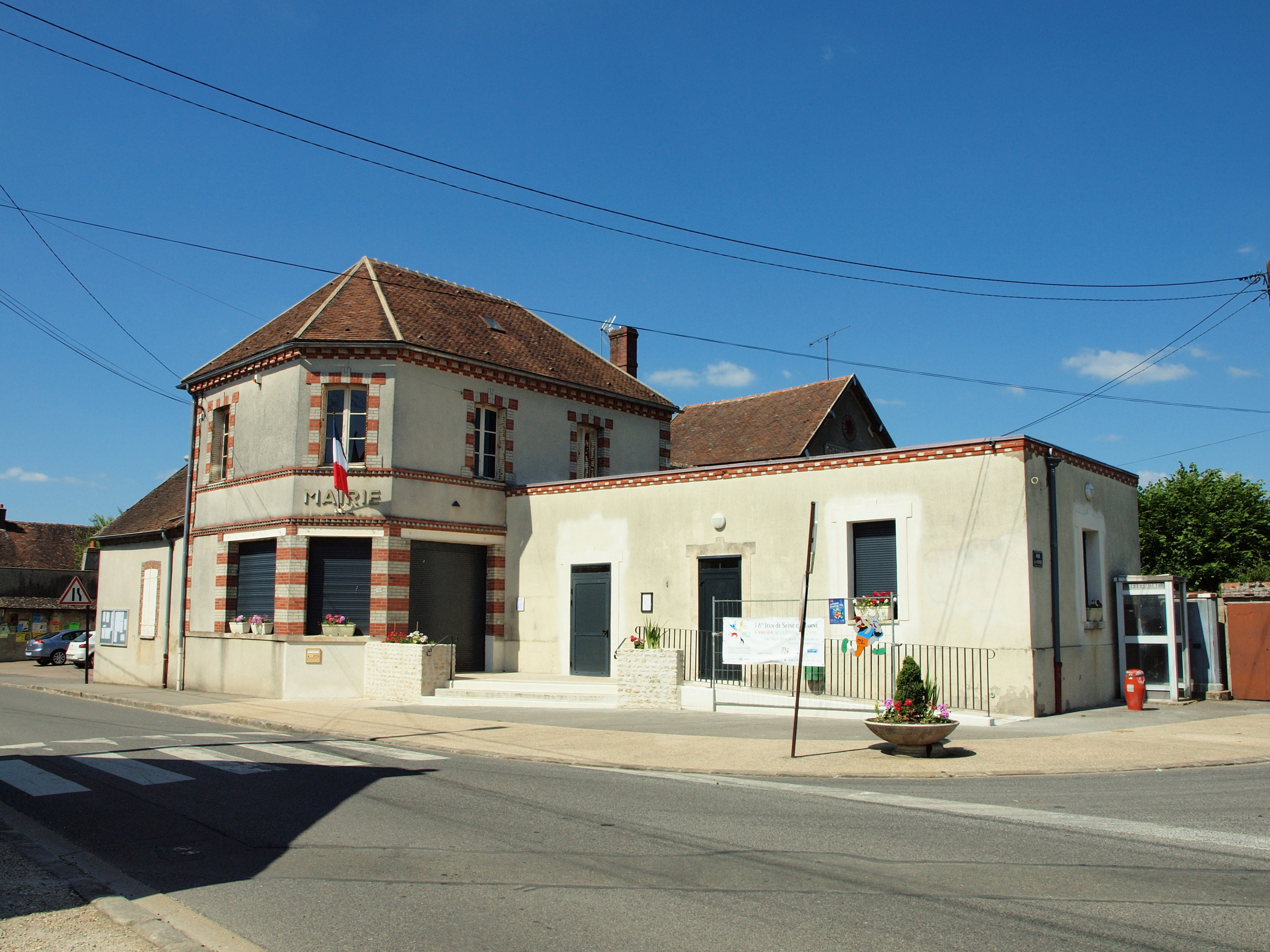 Mairie de Remauville (Seine et Marne, France)